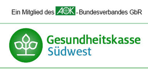 Logo Gesundheitskasse Südwest: Variante 1a